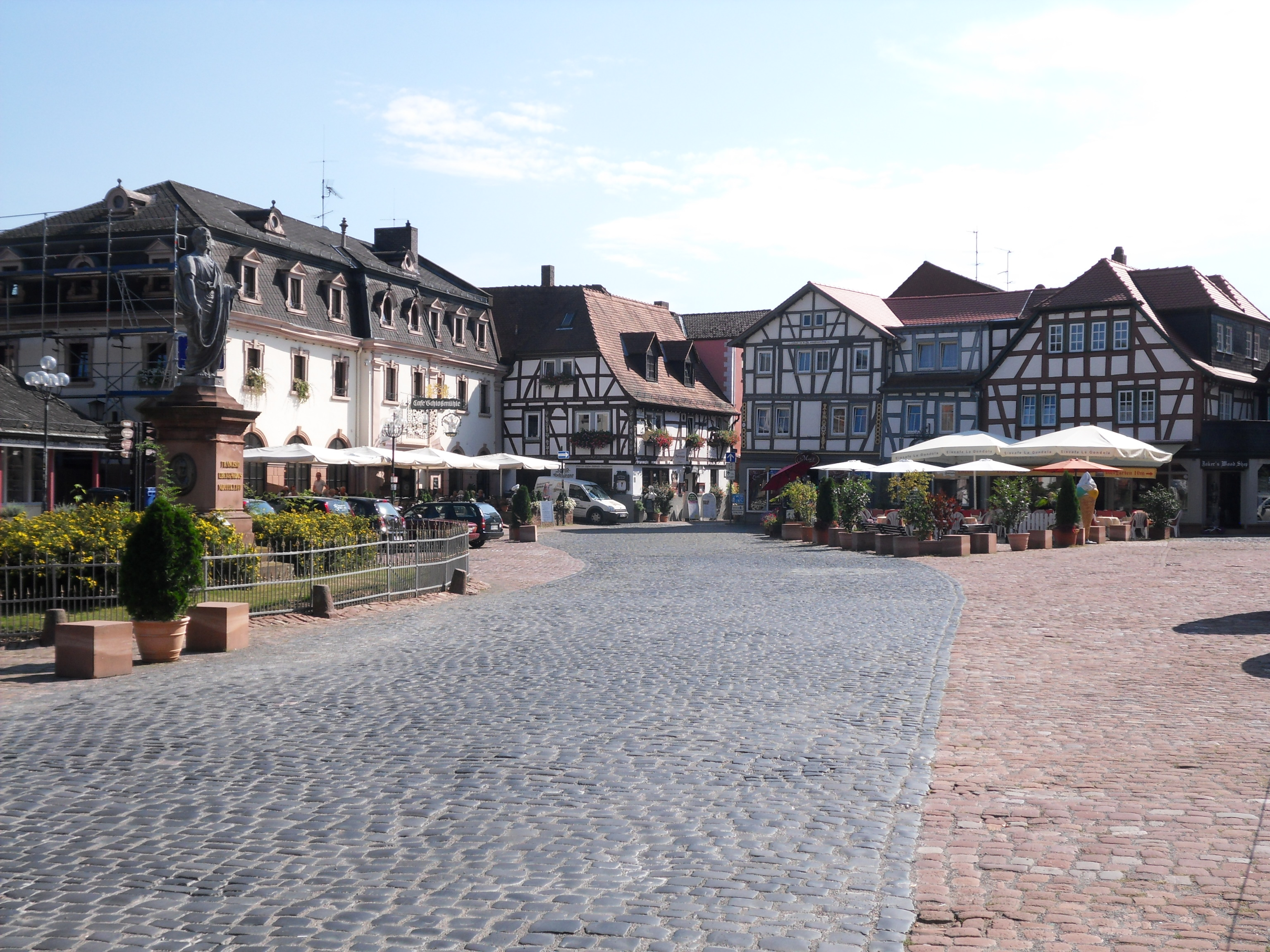 Südseite des Marktplatzes in Erbach (Odenwald) als Teil einer denkmalgeschützten Gesamtanlage. Im Bild das Denkmal für Graf Franz I., Schlossmühle, Gasthaus Zum Hirsch und die Fachwerkhäuser Bahnstraße 1 sowie Am Schlossgraben 2.